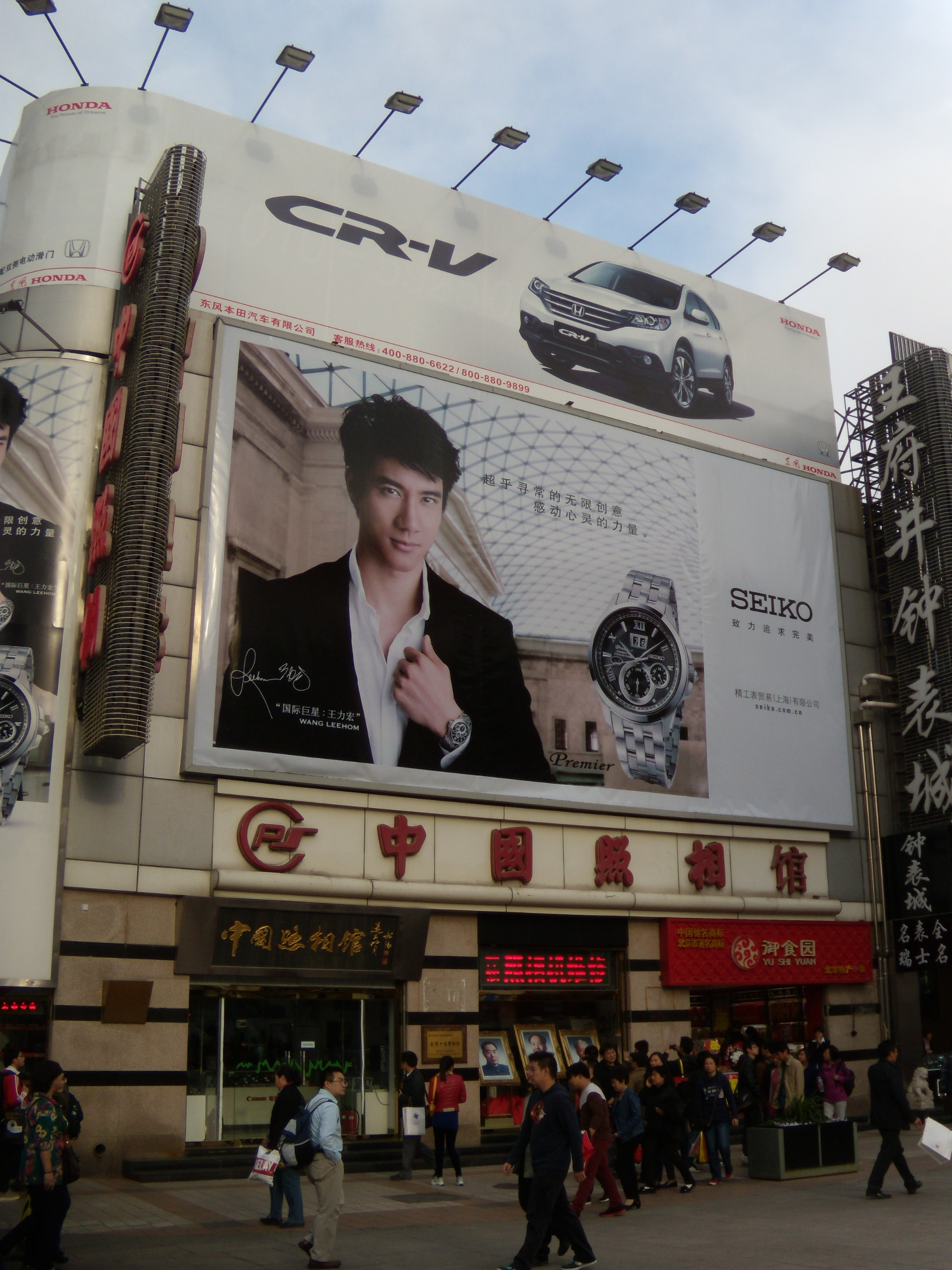 中国照相馆